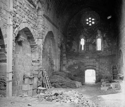 Imatge